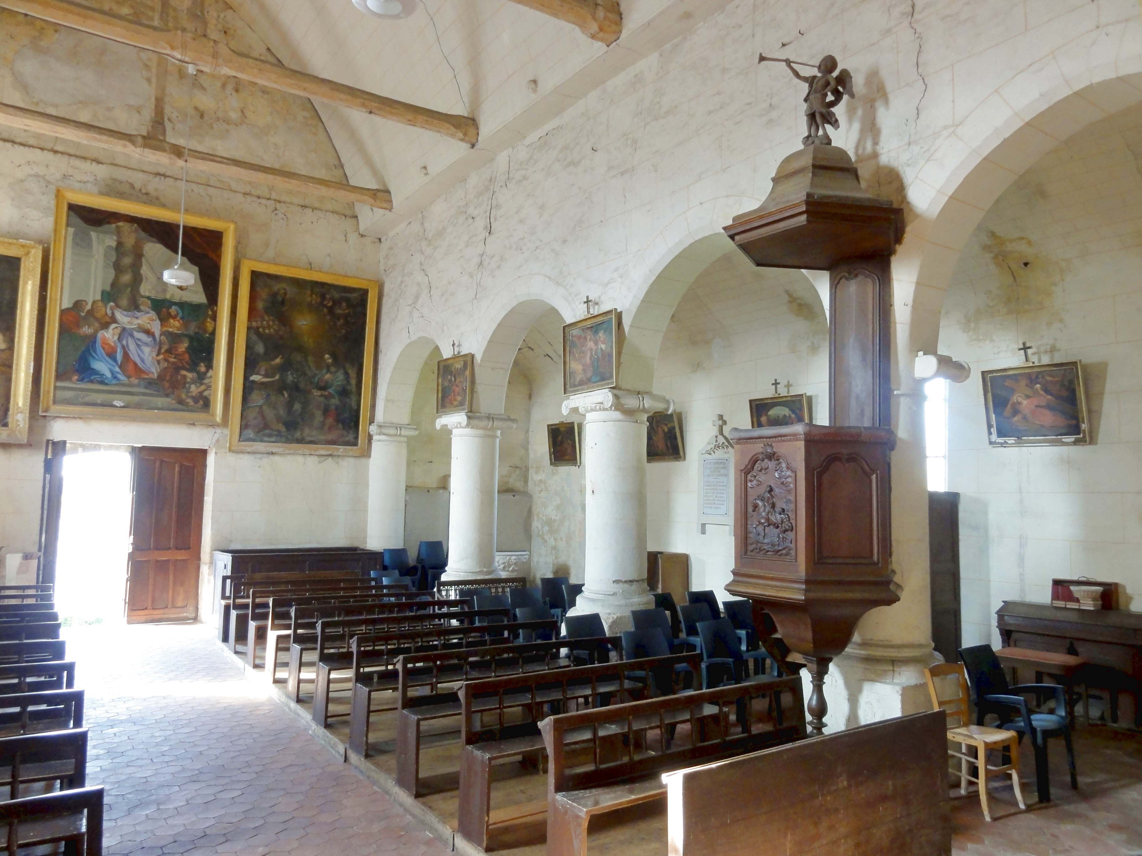 Intérieur de l'église - voir titre.